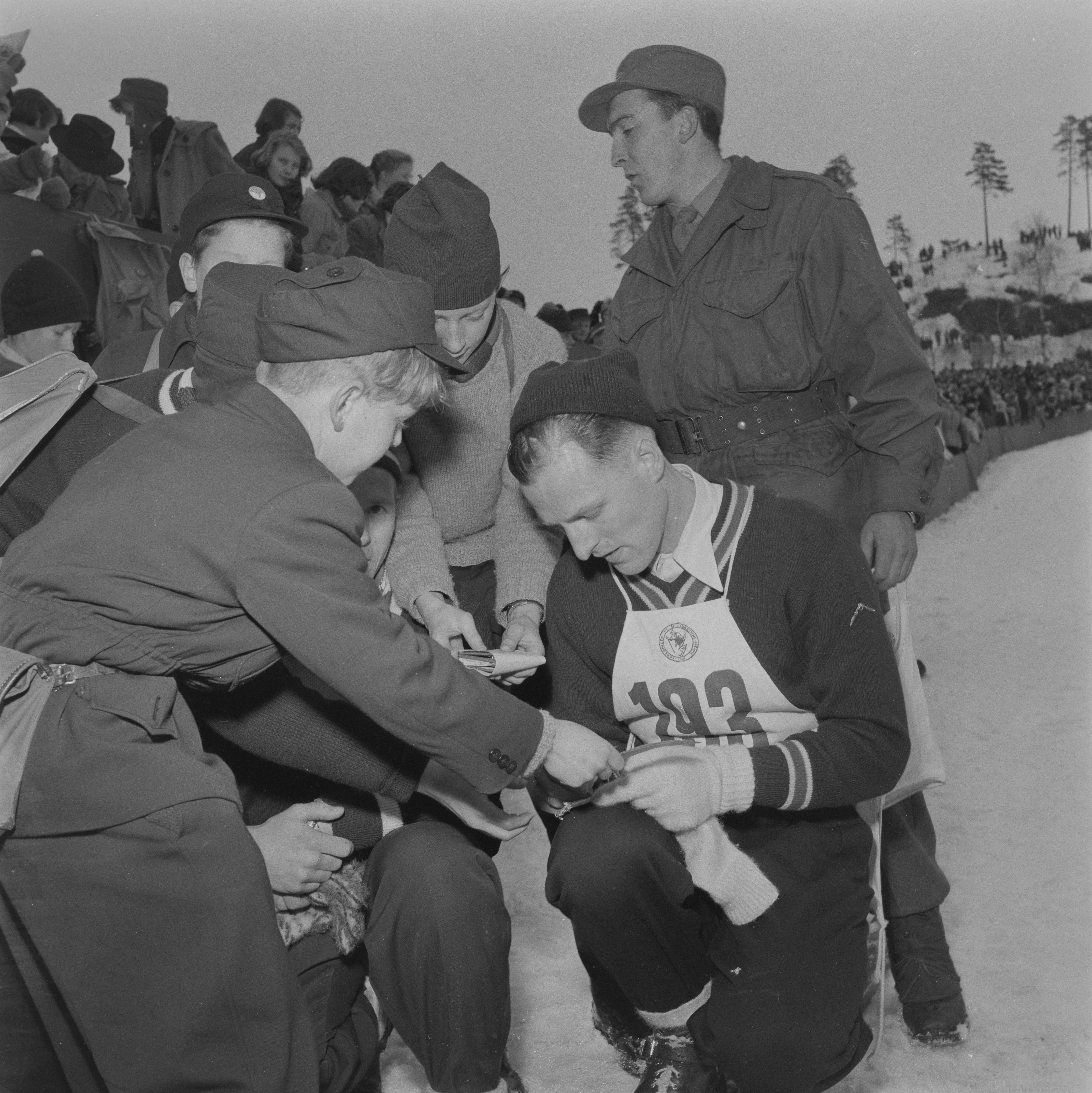 Bildet er hentet fra Arkivverket. Skihopper Thorbjørn Falkanger, født 08.10.1927, død 16.07.2013. Han fikk sølvmedalje i hopprennet under OL i 1952 i Oslo. Arkivinstitusjon : Riksarkivet Arkivnavn : Billedbladet NÅ Sted : Norge, Ukjent, Ukjent, Emneord: Norske skihoppere, Olympiske leker 1952, OL 1952 Avbildet: Falkanger, Thorbjørn